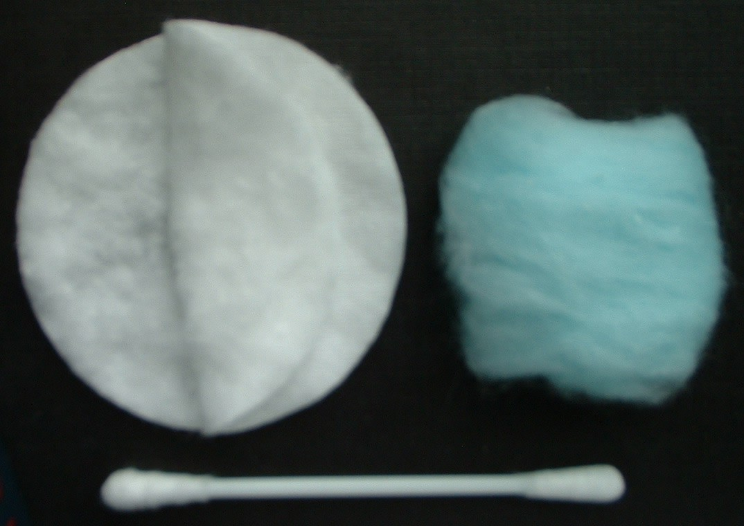 Watte für hygienische und kosmetische Zwecke